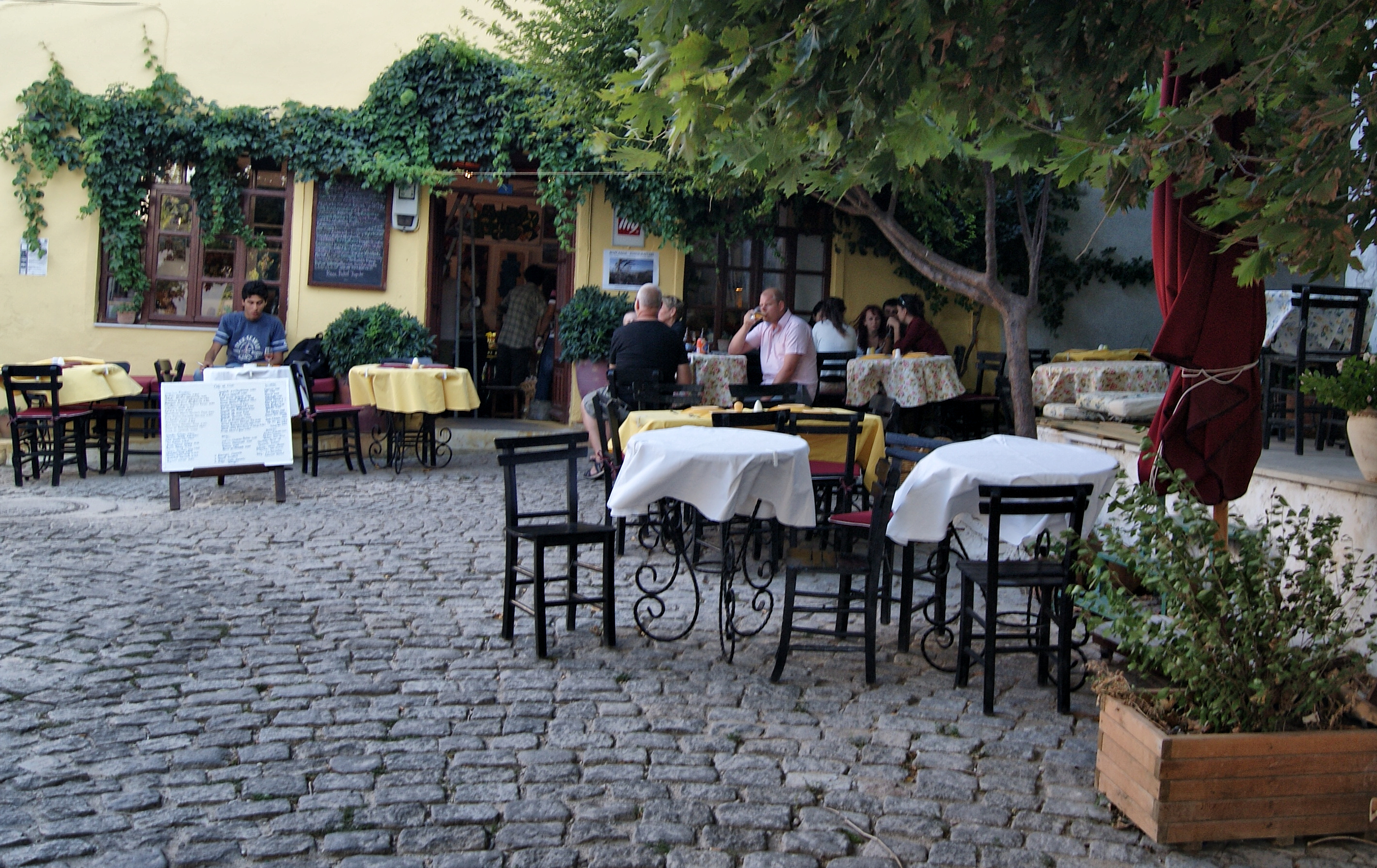 Bozcaada